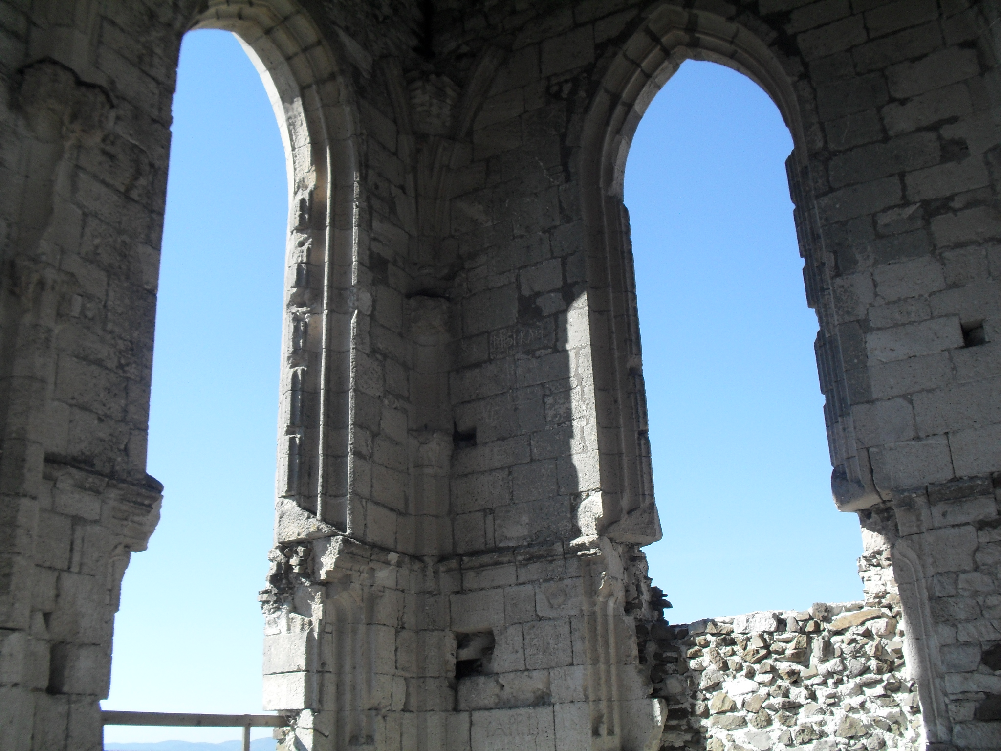 várrom This is a photo of a monument in Hungary. Identifier: 2767